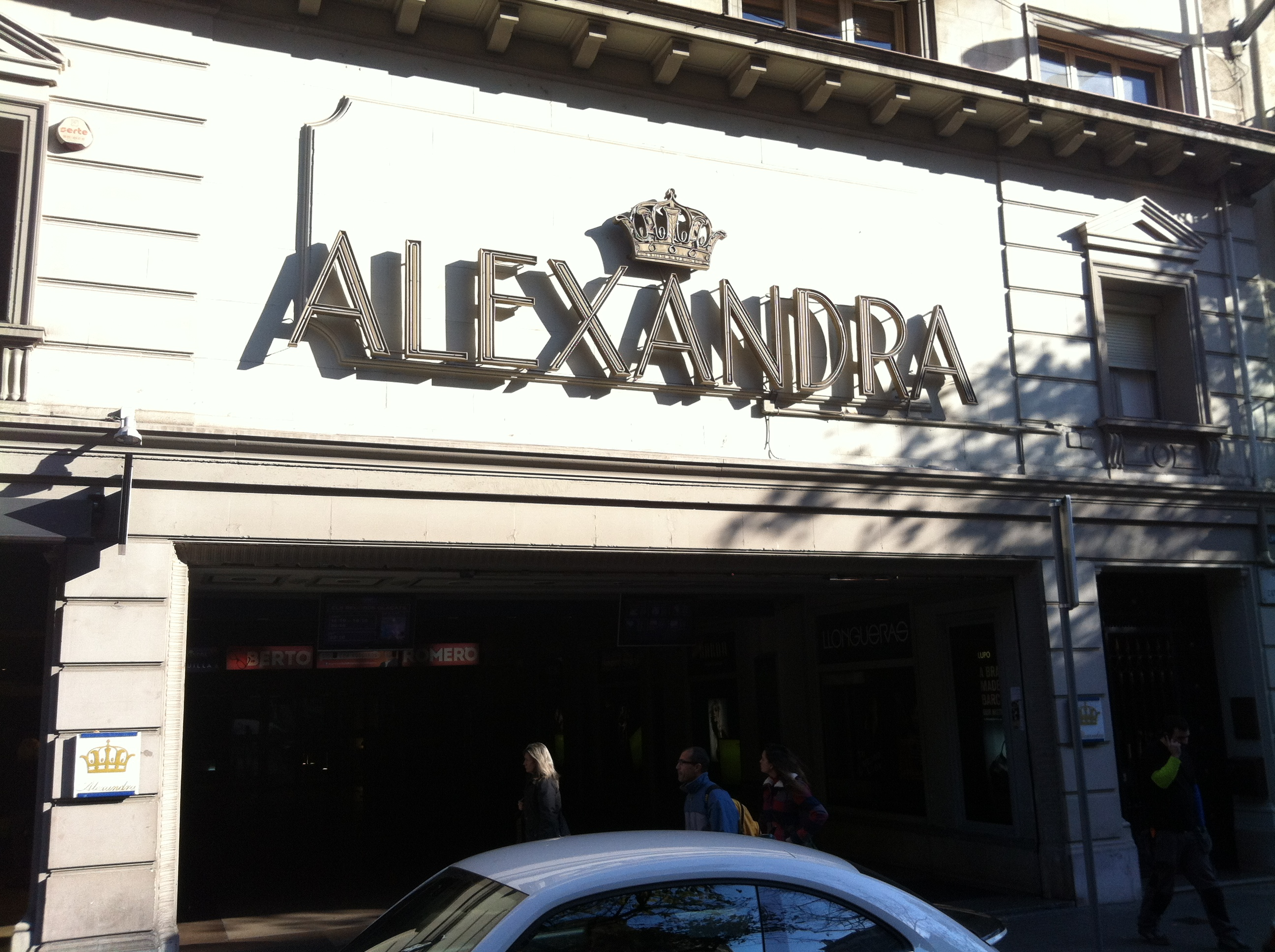 Cinemes Alexandra desembre 2013